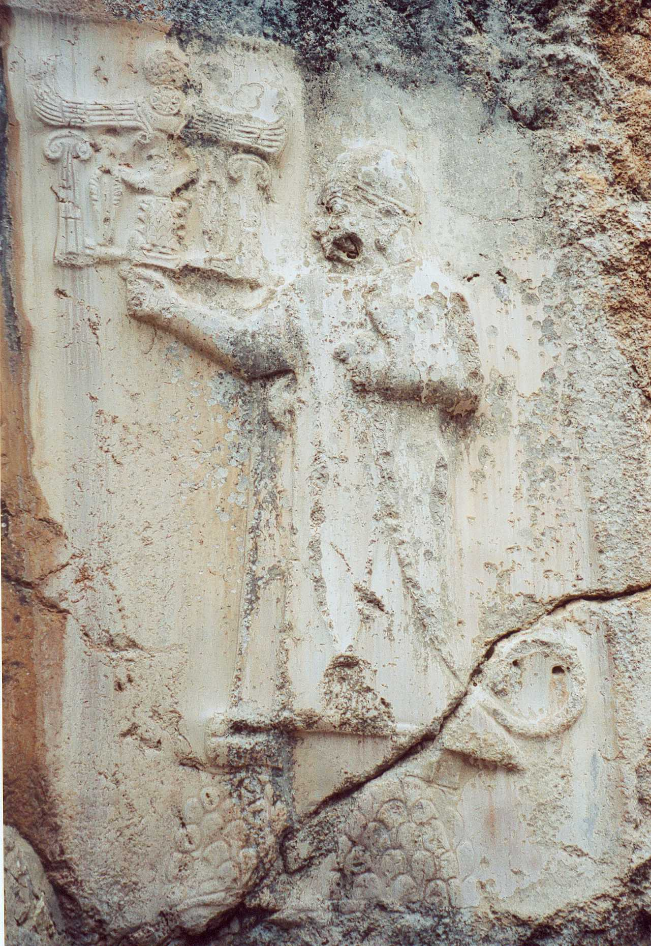 Tudhaliya IV, great king of the Hittites. Relief in Yazılıkaya, Turkey.